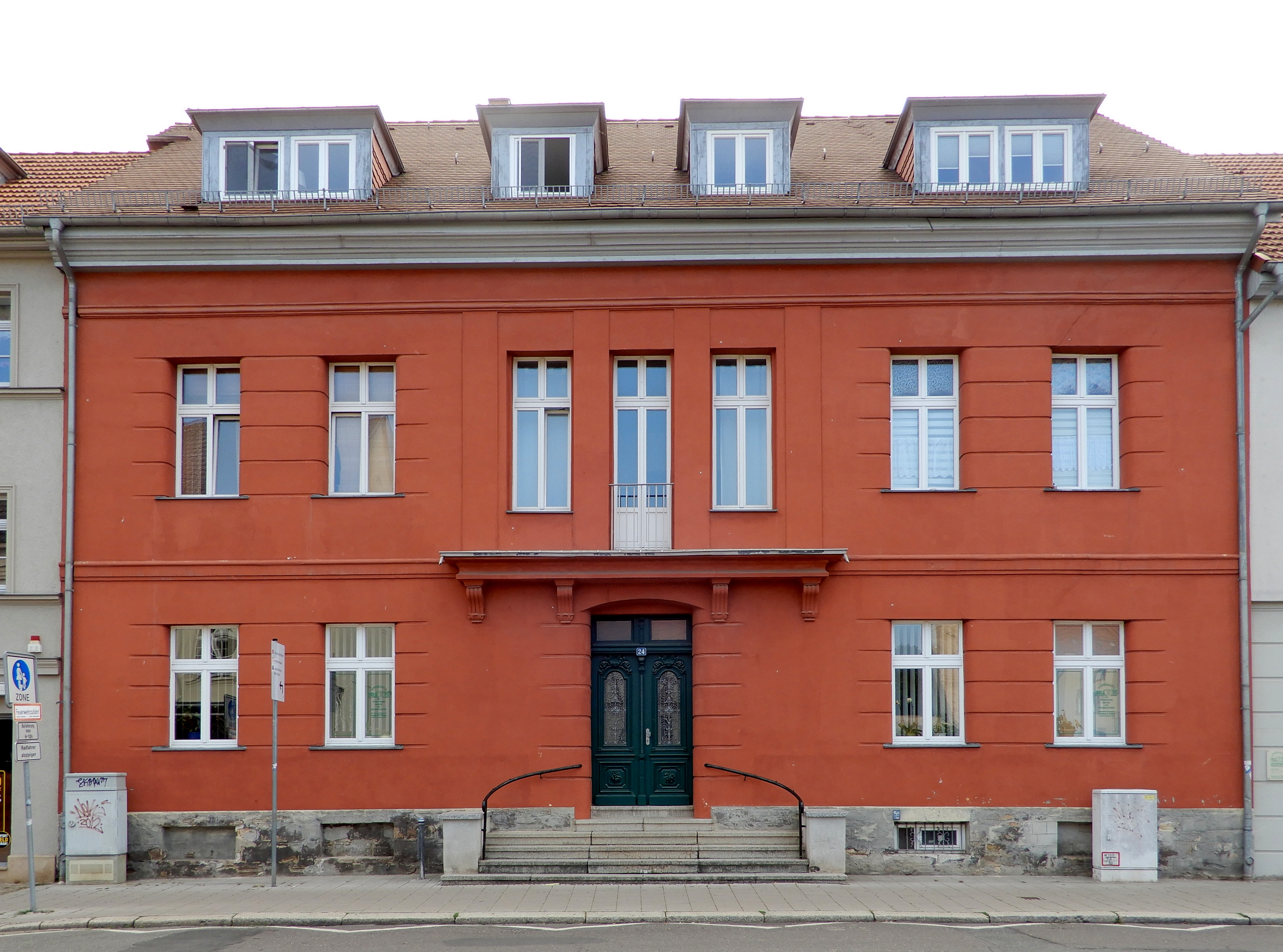 Gebäude Vorderbreite 24 in Aschersleben